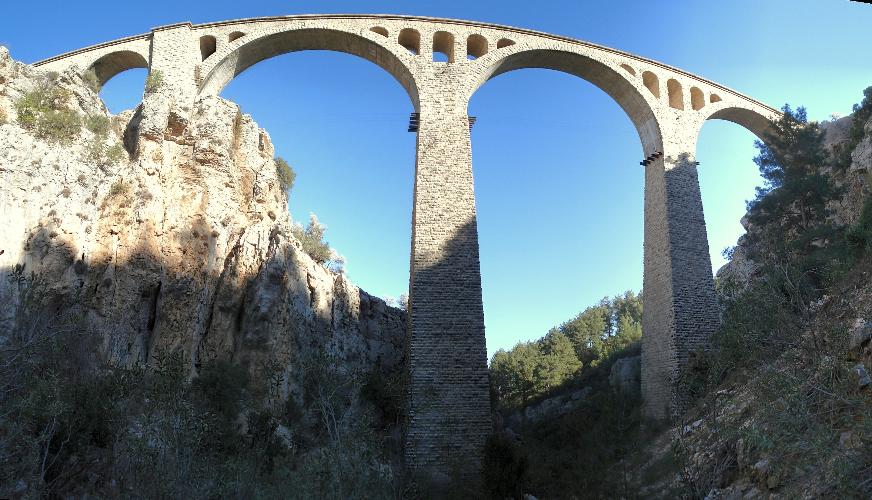 Türkçe